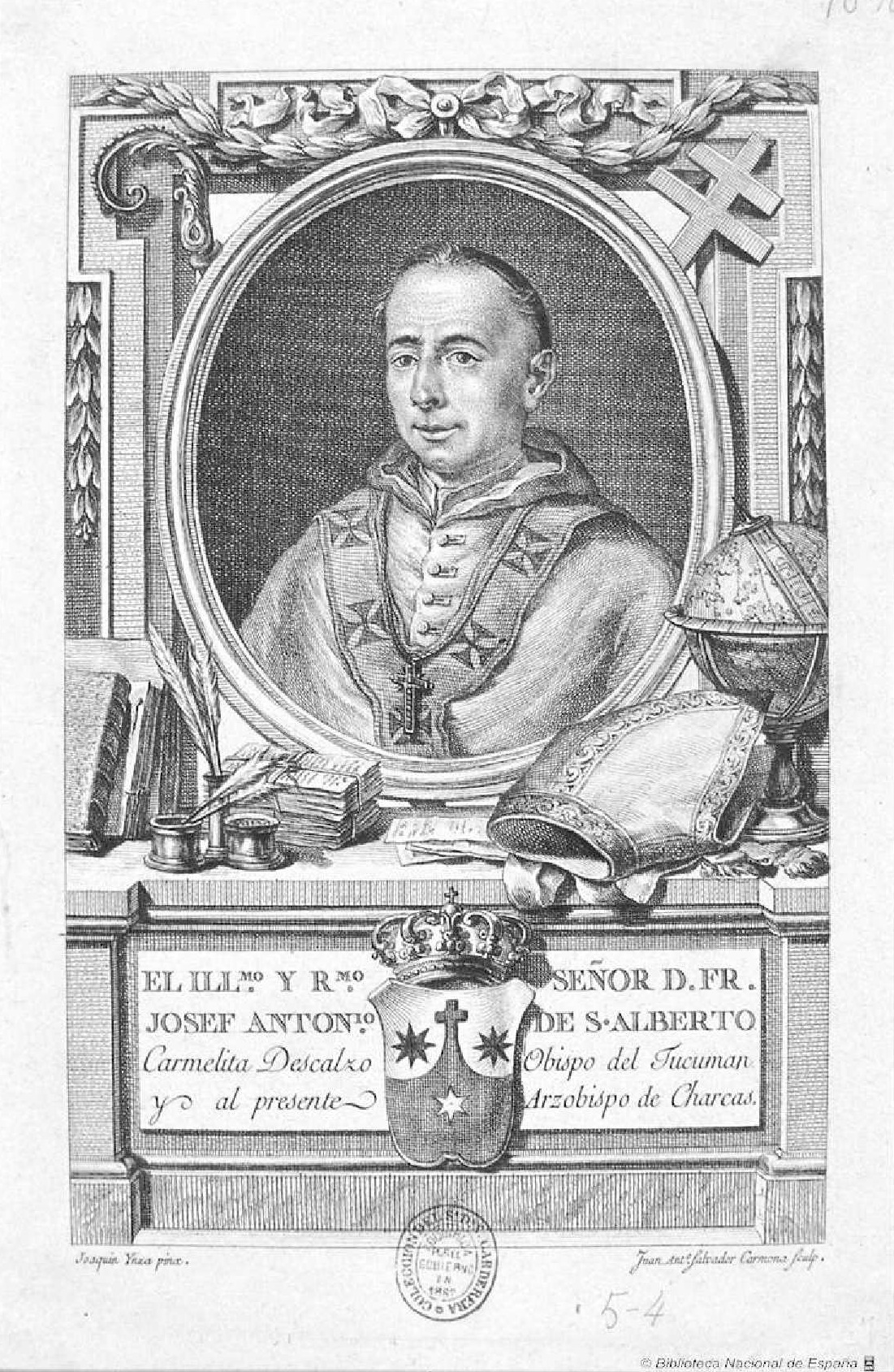 José Antonio San Alberto (obispo). Grabado de Juan Antonio Salvador Carmona, ilustración de la "Colección de instrucciones pastorales", por Fr. Joseph Antonio de S. Alberto. Madrid, 1786-Biblioteca Nacional de España. Inscripción: "El Illmo. y Rmo. Señor D. Fr. Josef Antonio de S. Alberto, Carmelita descalzo Obispo del Tucumán y al presente Arzobispo de Charcas"